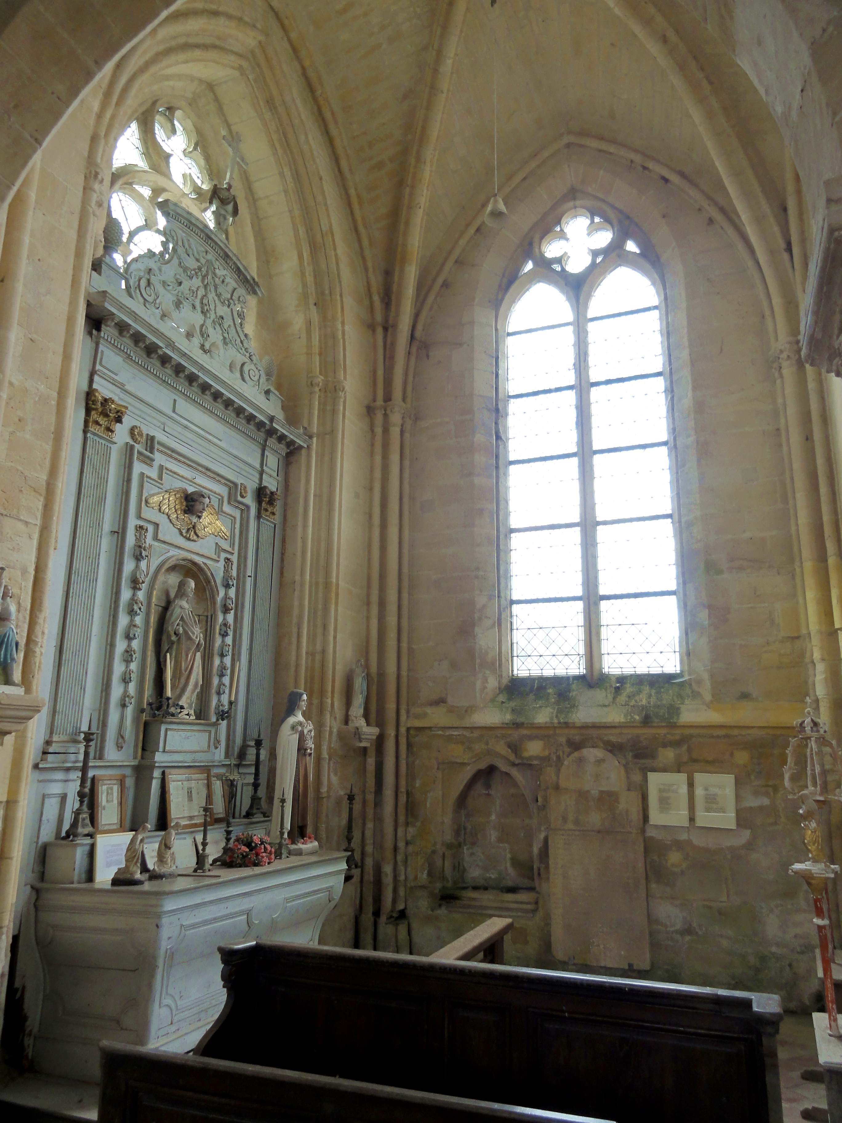 Intérieur de l'église (voir titre).